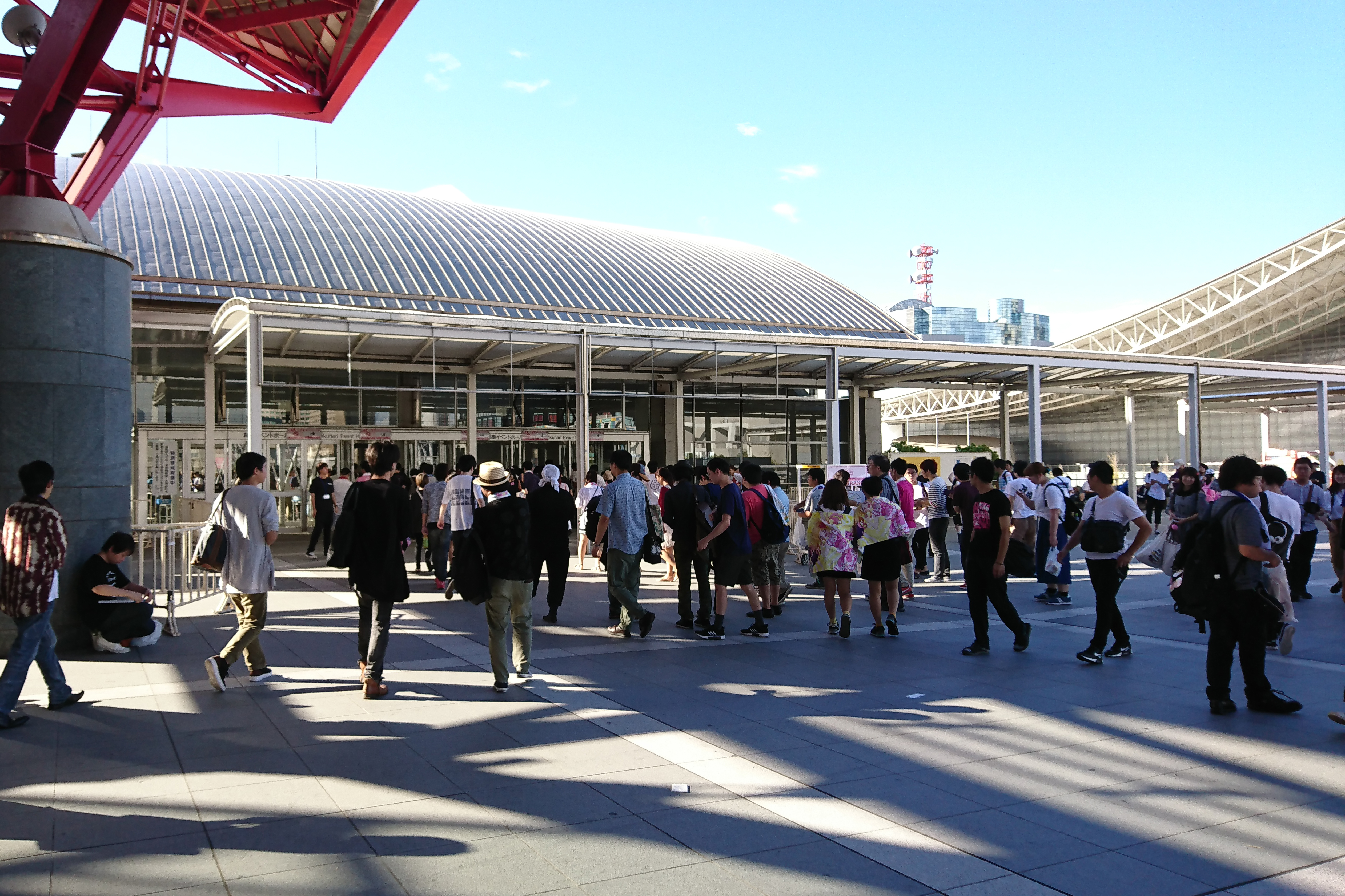 幕張メッセ内にある幕張イベントホールの入口。2018年9月9日撮影（当日、イベントホールではイベント「アイカツ！シリーズ 5thフェスティバル!!」2日目が開催された）。